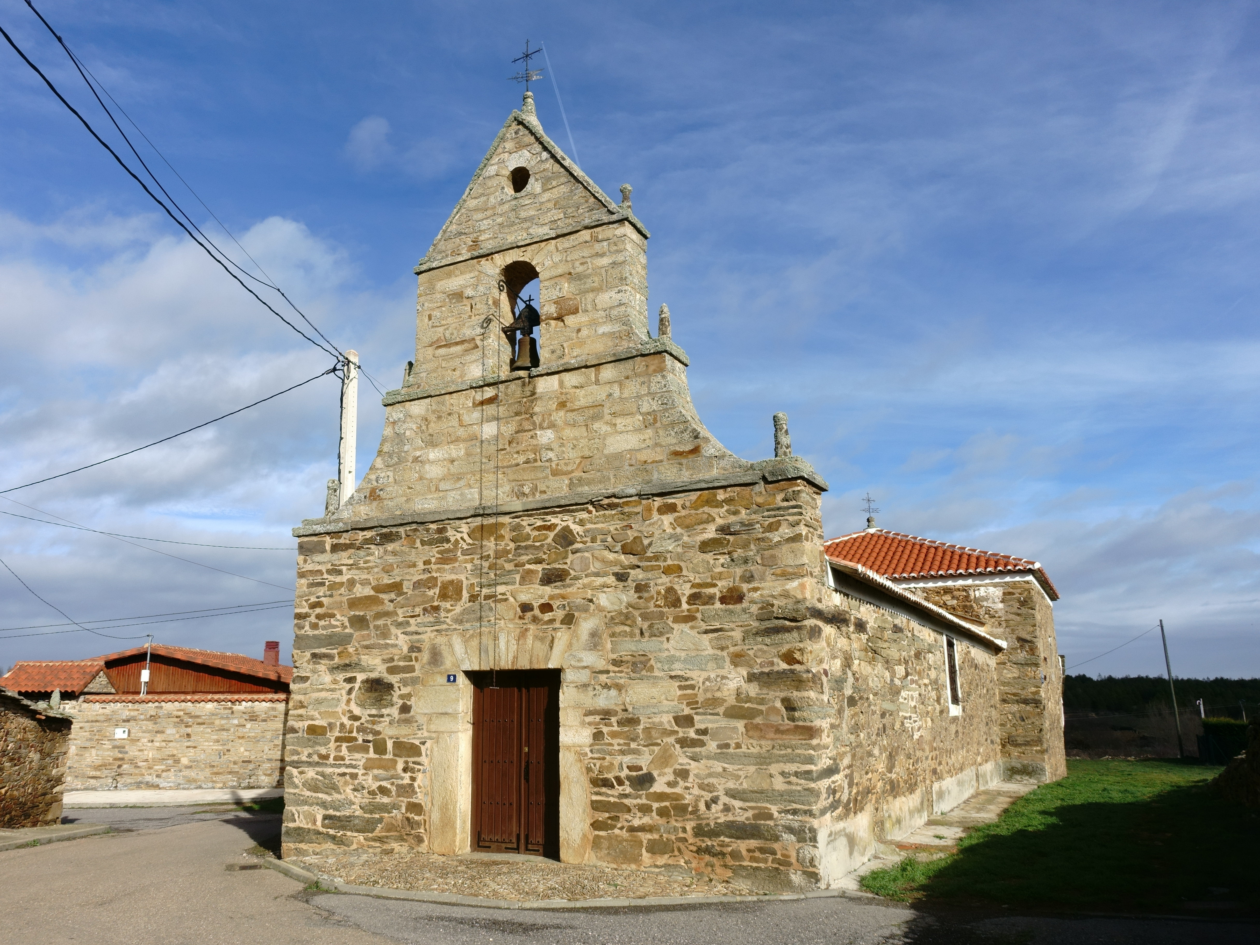 Ermita del Santo Cristo en el barrio de Abajo de Santiago Millas (León, España).